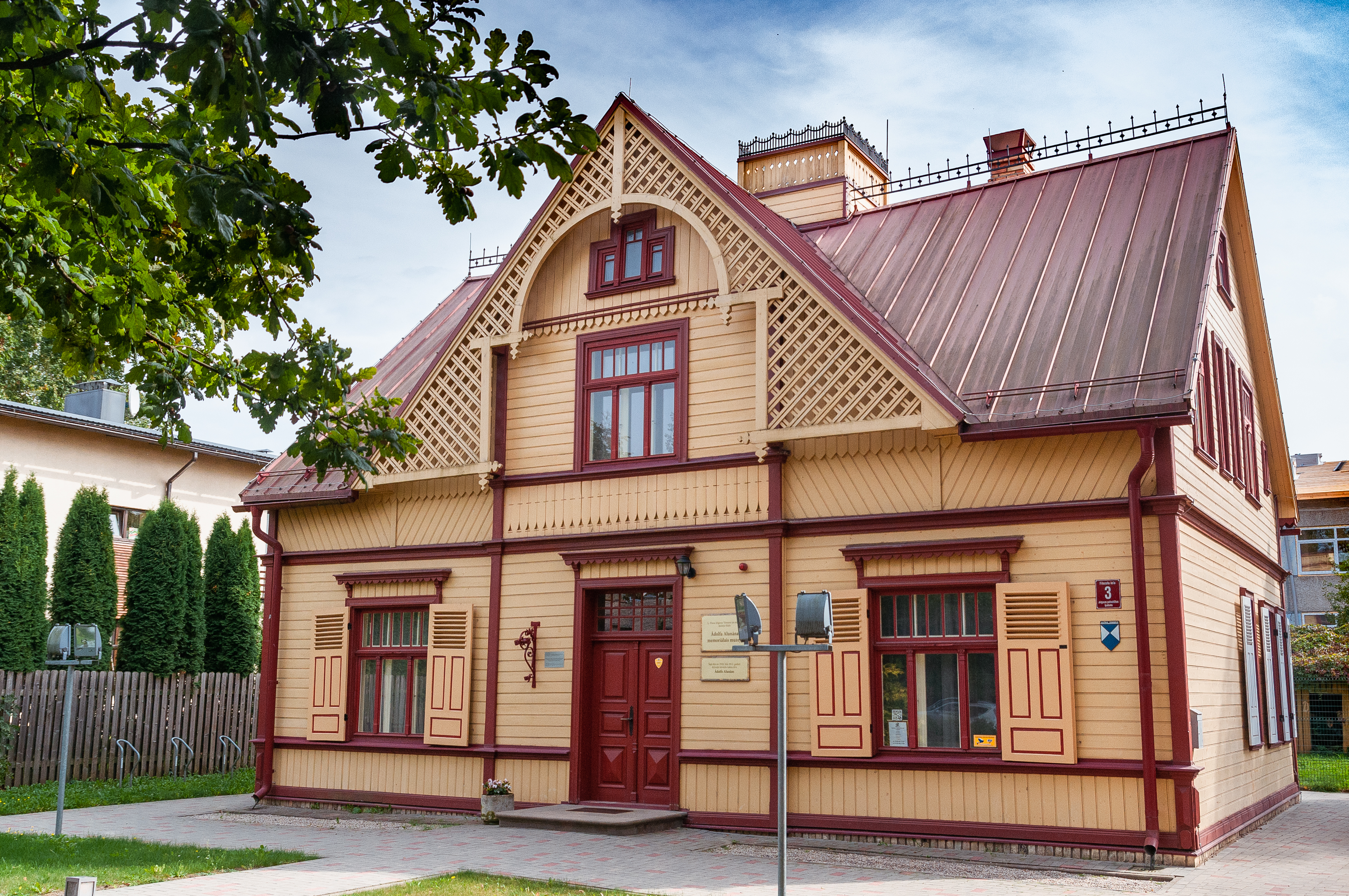 Ādolfa Alunāna memoriālā muzeja ēka Jelgavā, Filozofu ielā 3. 1910.-1912. valsts nozīmes vēstures piemineklis.